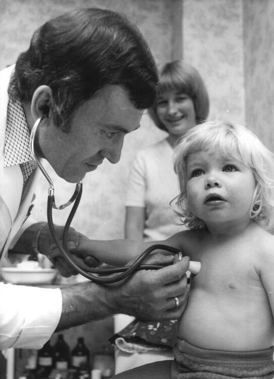 Dedelow, kinderärztliche Untersuchung ADN-ZB Link 22.8.85 Bez. Neubrandenburg: Dorfporträt Dedelow-Keine Angst vor dem Doktor hat die kleine Manja. Wenn die Mutti mit ihr in die Arztpraxis zum Kinderarzt Dr. Bartels kommt, muß sie nicht lange warten, denn das Bestellsystem für regelmäßige Untersuchungen funktioniert gut. Zwei Ärzte, eine Sprechstundenhilfe und eine Gemeindeschwester sorgen sich um das gesundheitliche Wohl der 1322 Einwohner von Dedelow. siehe auch 1985-0822-6-12und 14N sowie 1984-1115-17 - 20N Information added by Wikimedia users.English Description: A male German paediatrician uses a stethoscope to listen to a young girl's heart and lungs